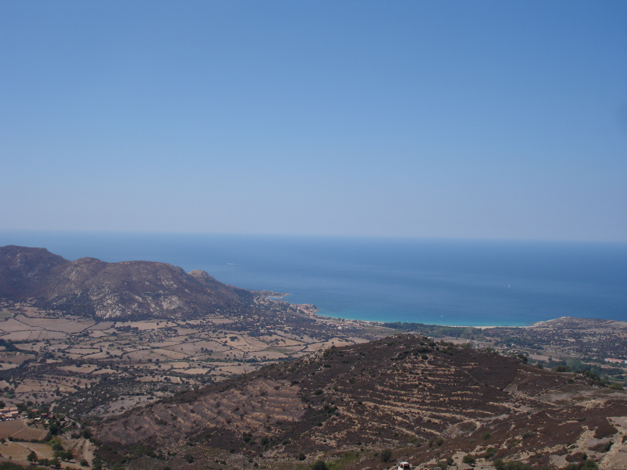 France, Haute-Corse (2B), Vallée d'Aregno